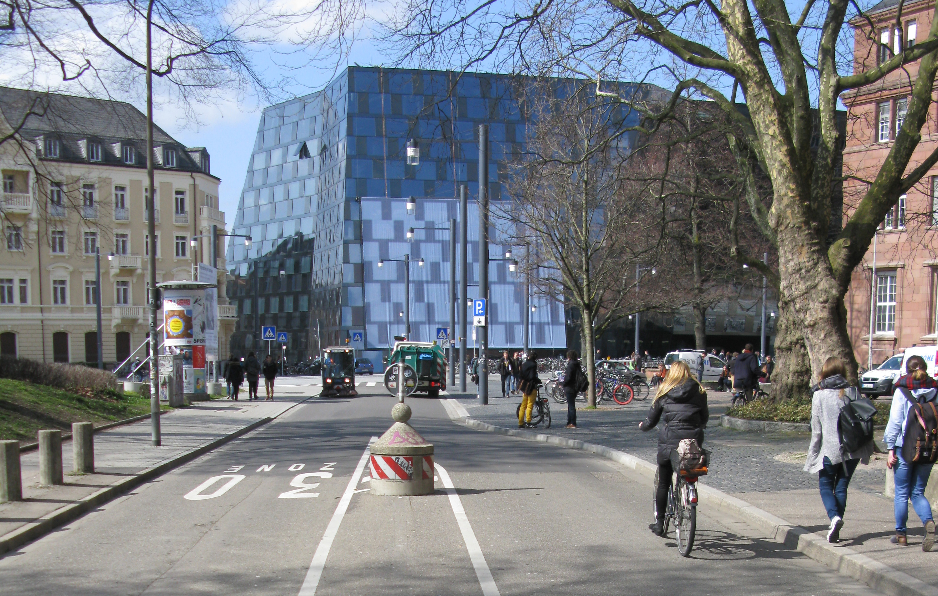 Universitätsbibliothek Freiburg mit Sonnensegel zur Vermeidung der Blendung der Verkehrsteilnehmer